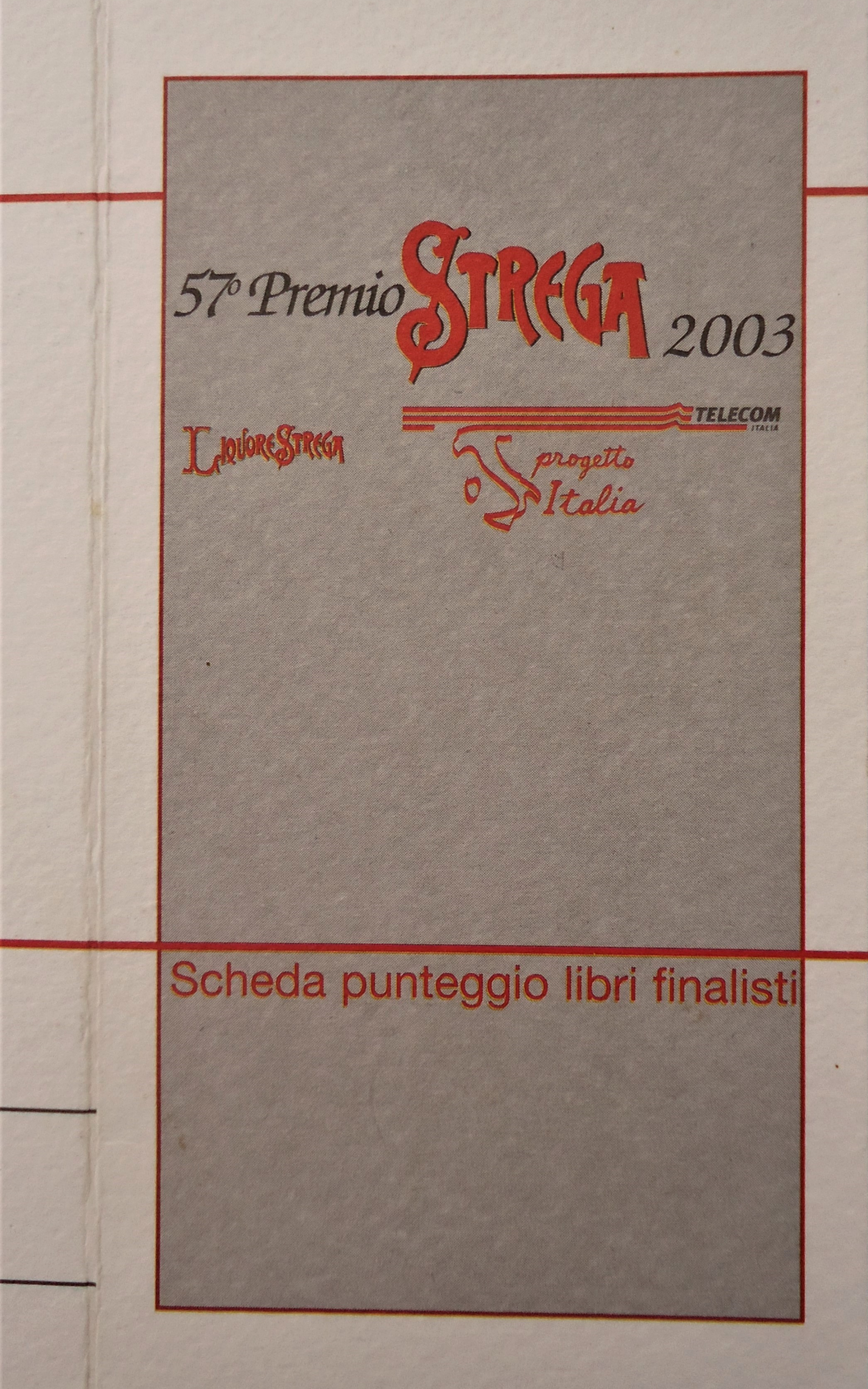 Scheda per il punteggio dei libri finalisti al premio Strega 2003.